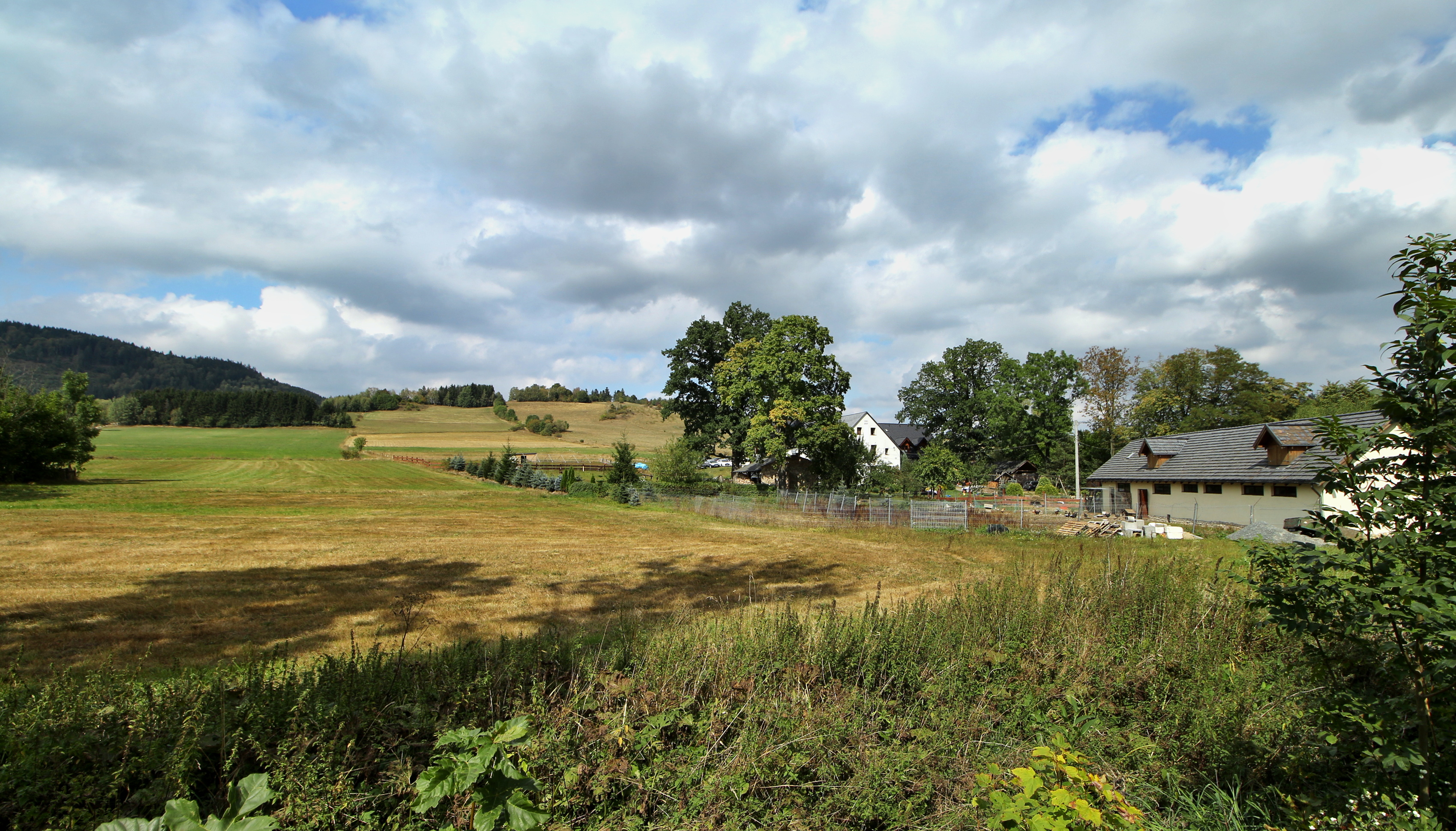 Stara Białka (Lubawka)